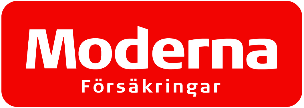 Moderna Försäkringar